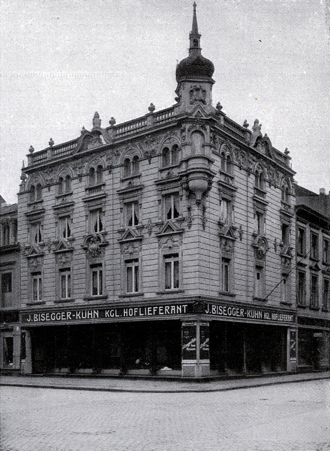 Bisegger-Kühn, Kgl. Hoflieferant. Feine Pelzwaren.